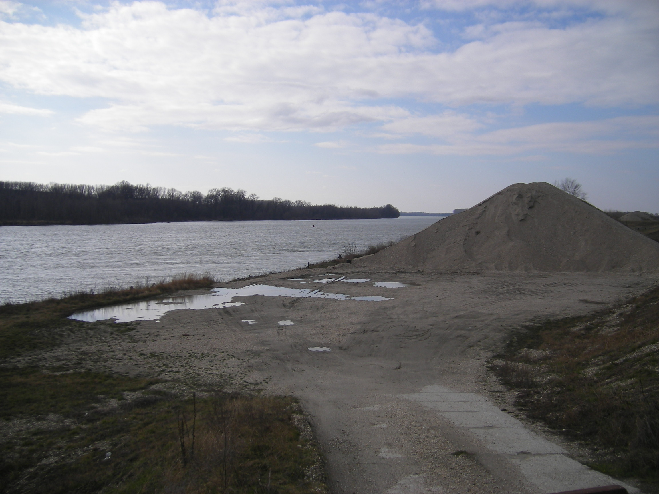 Maľé Kosihy (KN) breh Dunaja Duna-part a Kiskeszi falurésznél, kavicskitermelés